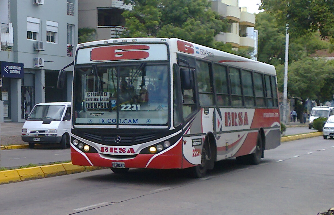 Colectivo Línea 6, interno 2231, empresa ERSA Urbano, matrícula IWY439, motor Mercedes Benz, carrocería Metalpar Tronador II. Paraná, Entre Ríos, Argentina. ColectivosEntreRios.